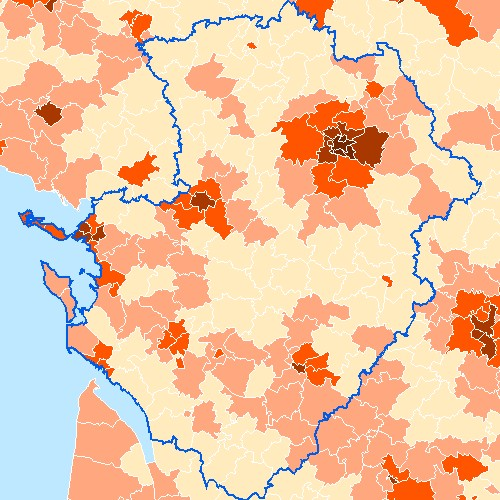 Carte des plus de quinze ans disposant d’un diplôme de l’enseignement supérieur, par rapport à la population des plus de quinze ans, dans la région Poitou-Charentes, en 1999, par Canton. Légende : Image:Population_de_plus_de_15_ans_diplomée_dans_la_région_Poitou-Charentes,_en_1999.jpg Cette carte est généreusement fournie par l'IAAT (Institut atlantique d'aménagement du territoire) Je la place comme convenu avec eux sous licence GFDL Utilisateur:Archeos Catégorie:Carte Poitou-Charentes